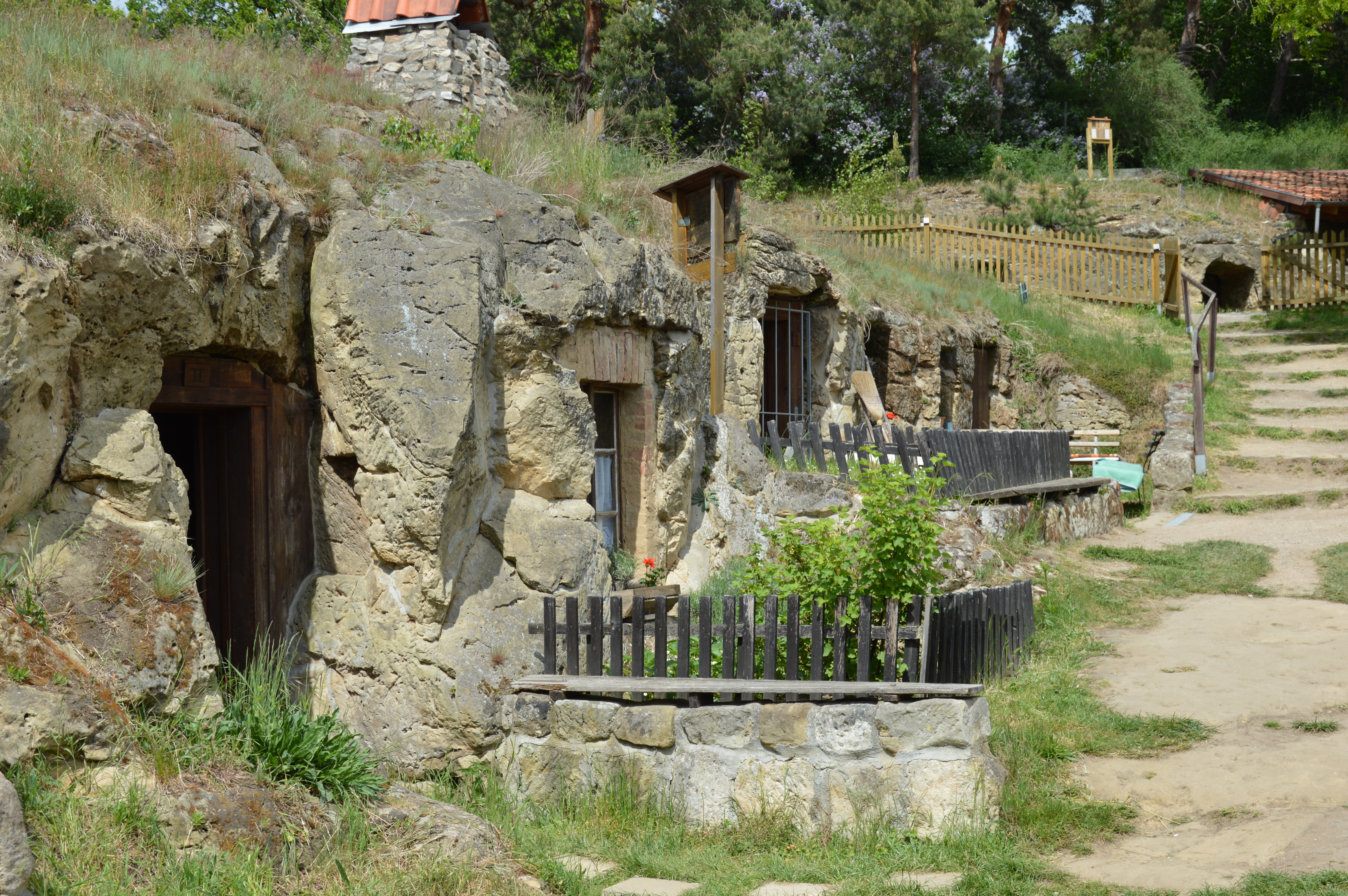 Höllenwohnungen in Langenstein